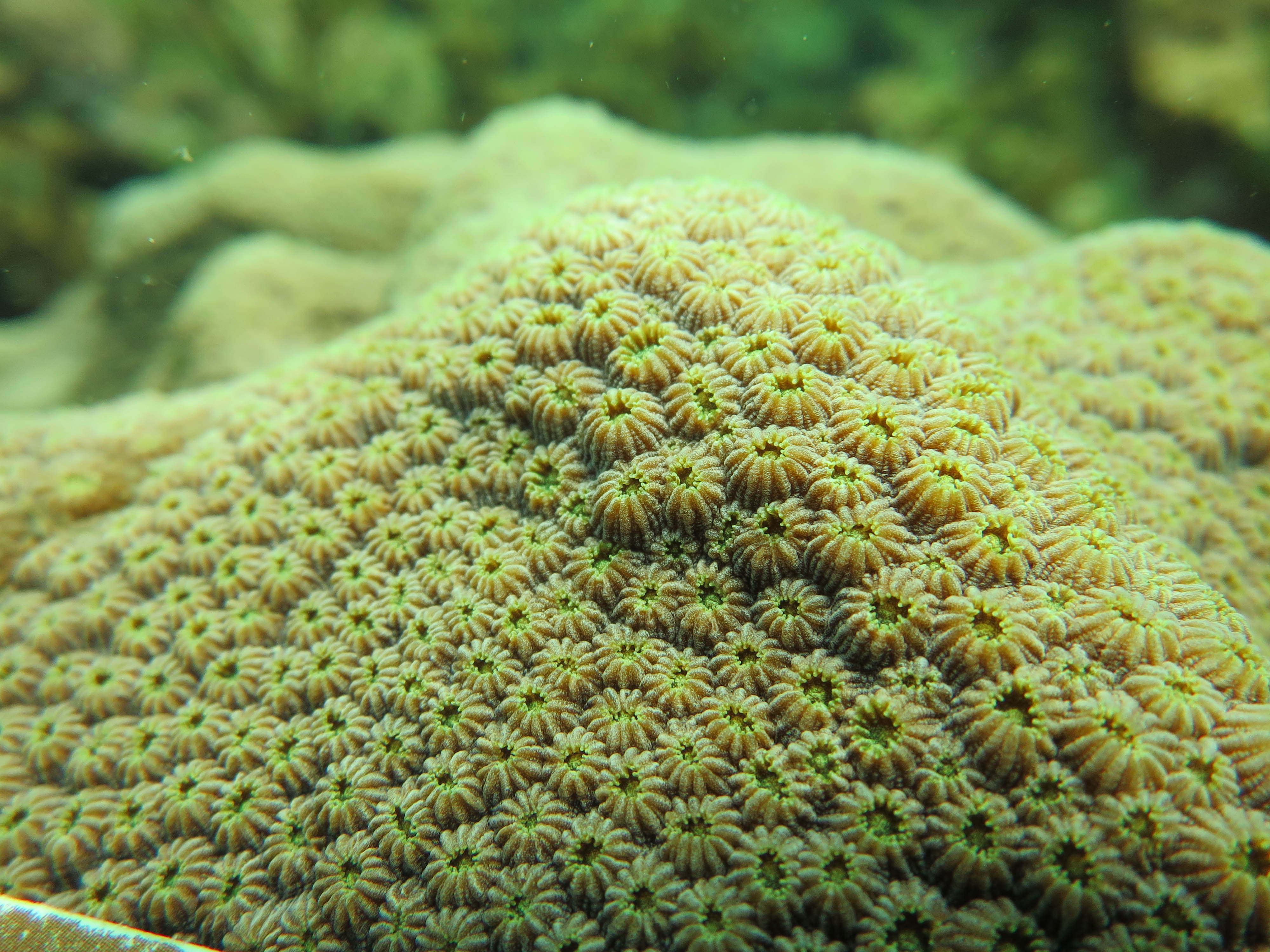 Orbicella faveolata, Cartagena, Colombia